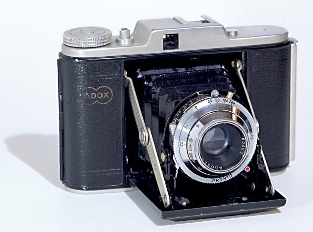 Adox Fotowerke Frankfurt/M., Objektiv Will (Wetzlar)-Adoxar, ca. 1953